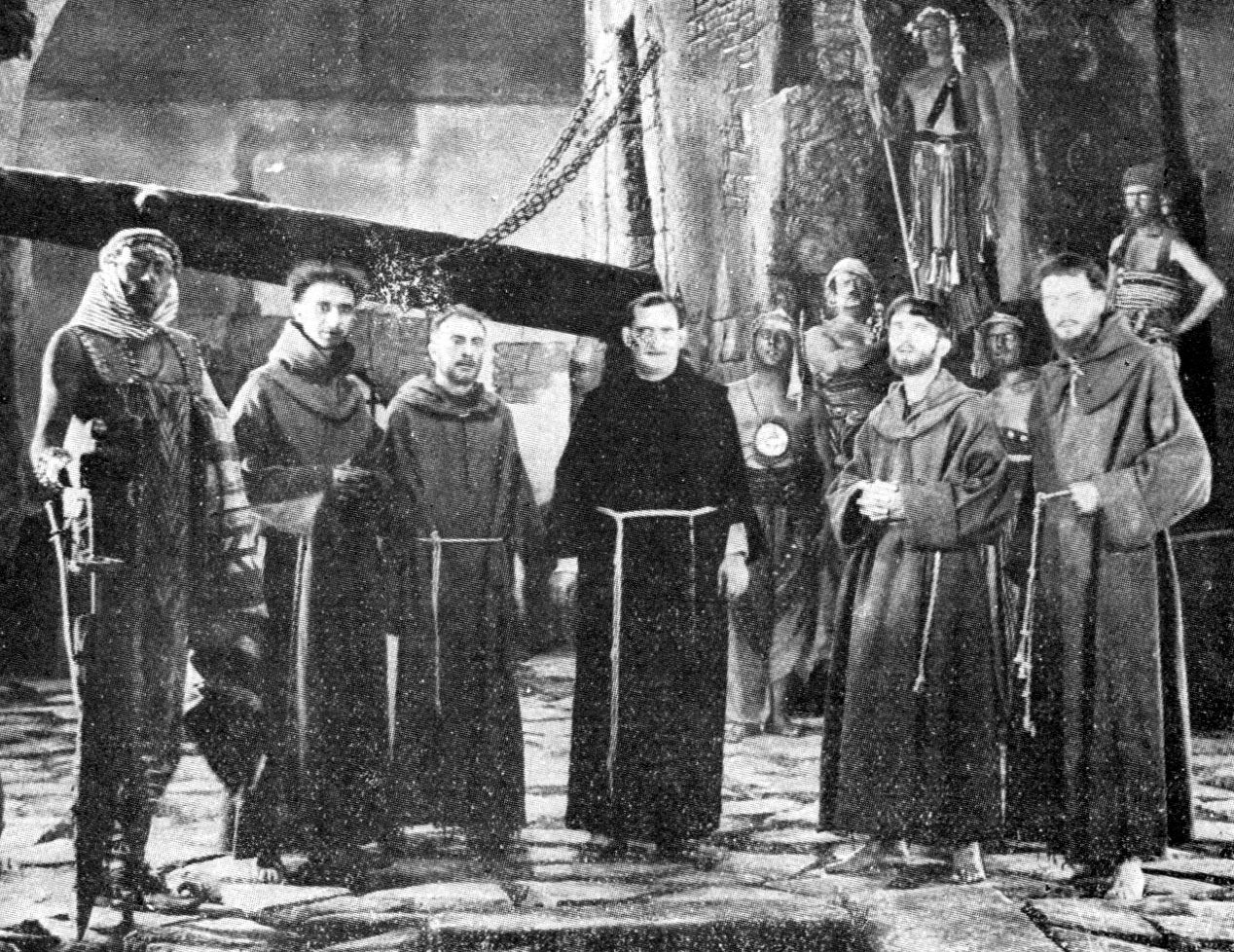 Fotogramma del film muto Antonio da Padova, il santo dei miracoli, regista Giulio Antamoro, produzione S.A.C.R.A.S. Roma - Firenze, 1931